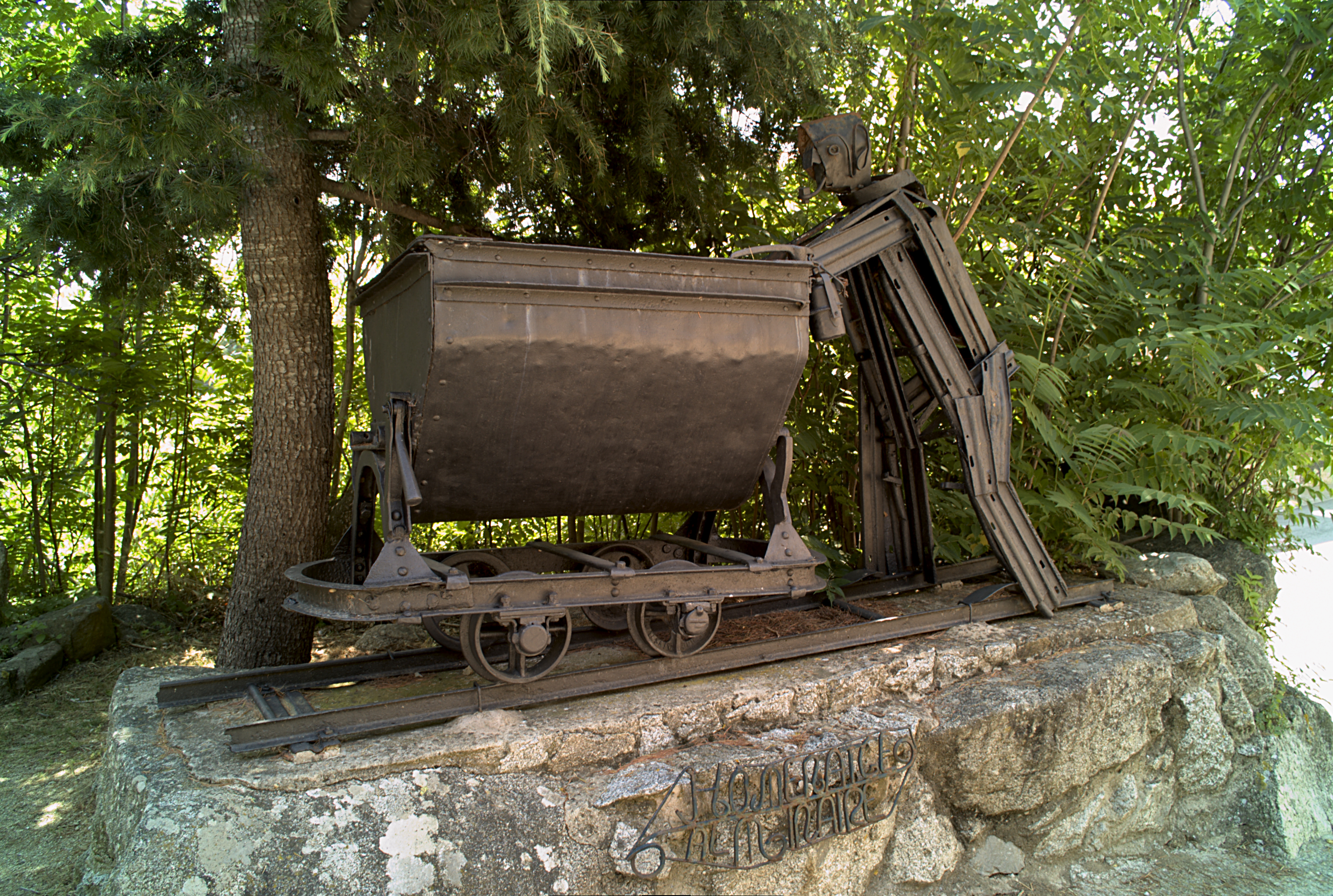 Hommage au mineur, Lluís Companys et sa femme, Rue des Mines, La Vajol (Haut-Ampurdan, Gérone, Catalogne, Espagne)